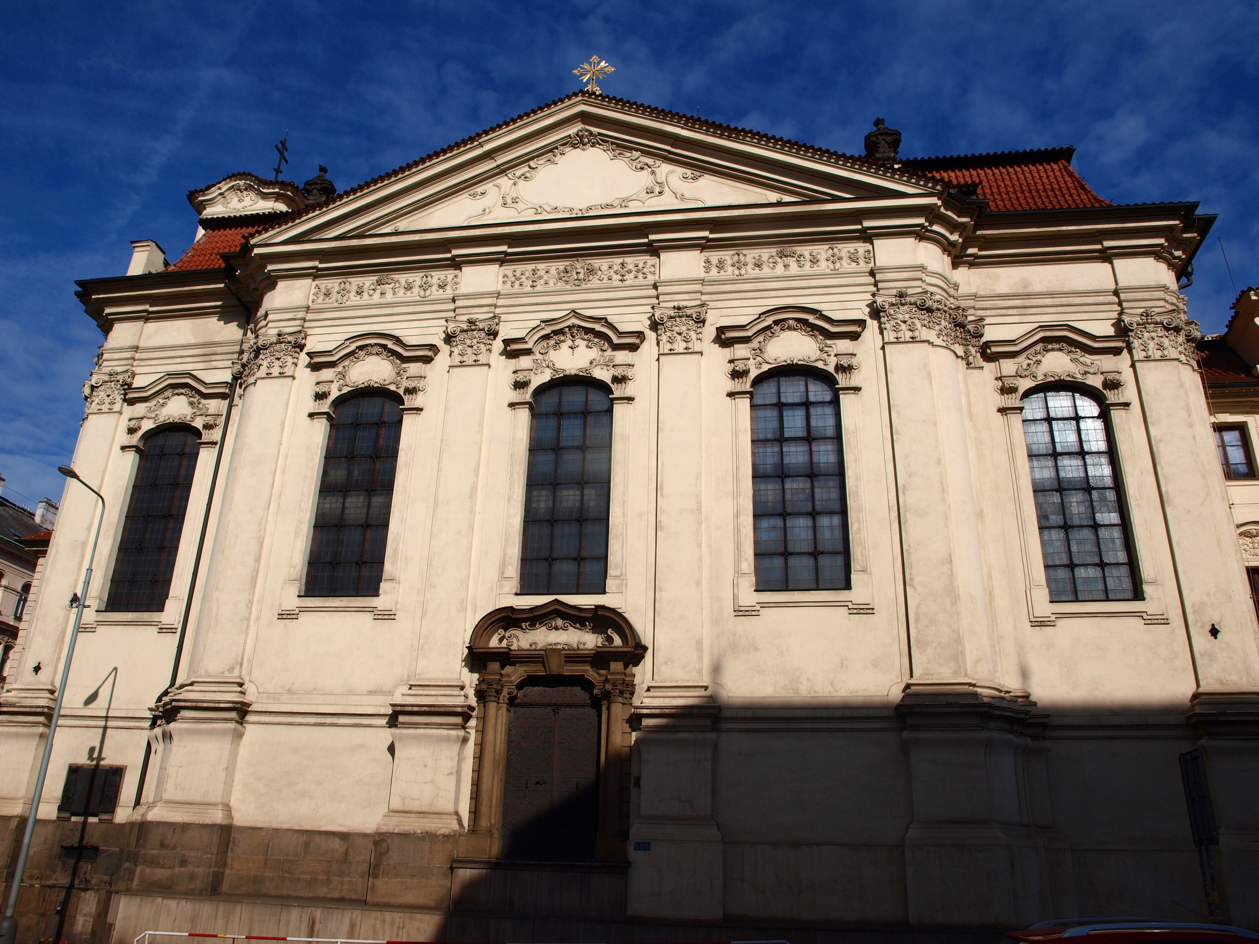 Pravoslavný katedrální chrám sv. Cyrila a Metoděje v Praze